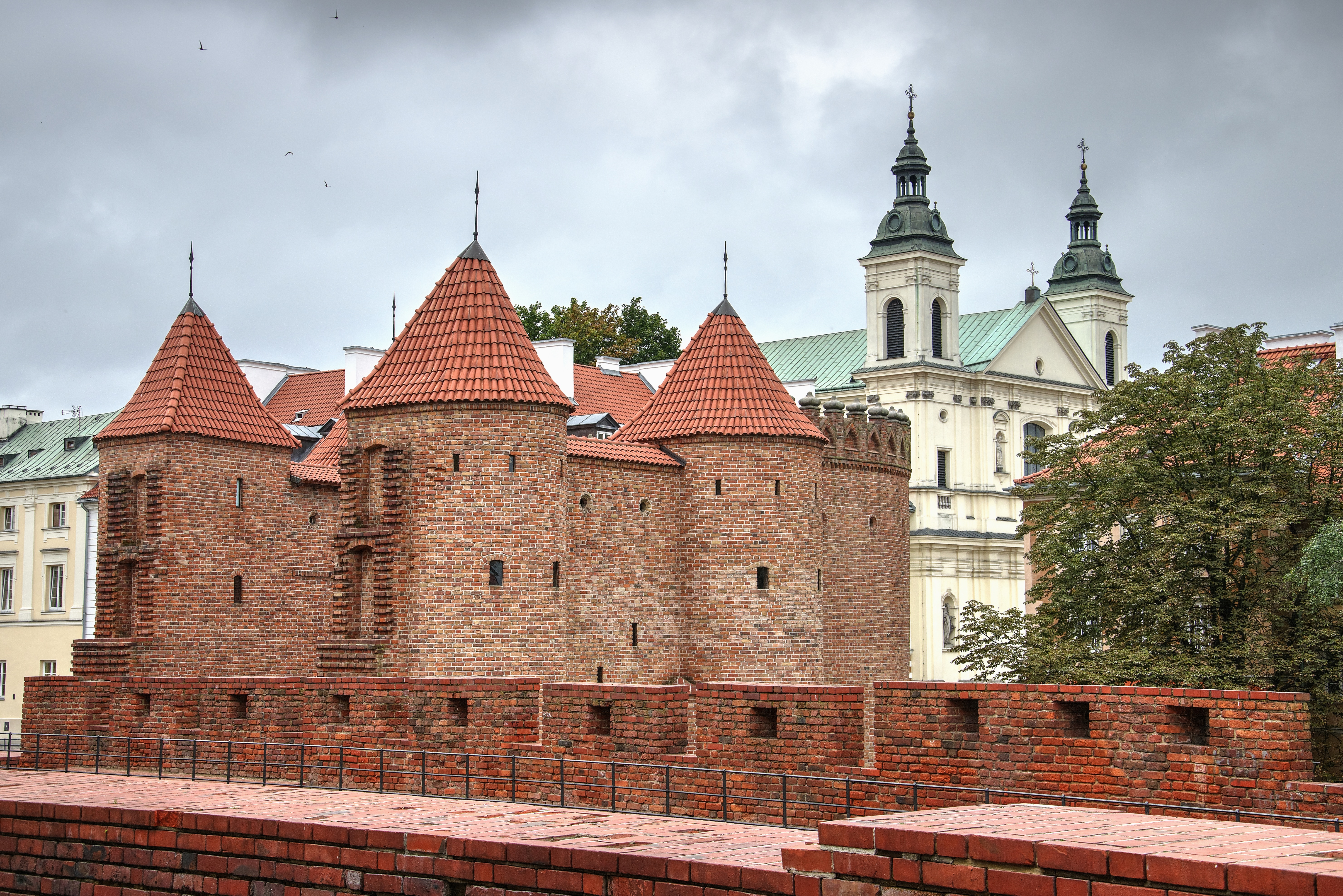 Barbakan i Kościół paulinów pod wezwaniem Św. Ducha w Warszawie